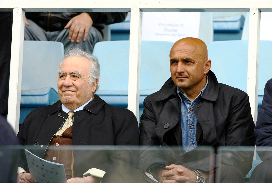 Franco Sensi durante la finale della seconda edizione del Wojtyla Cup